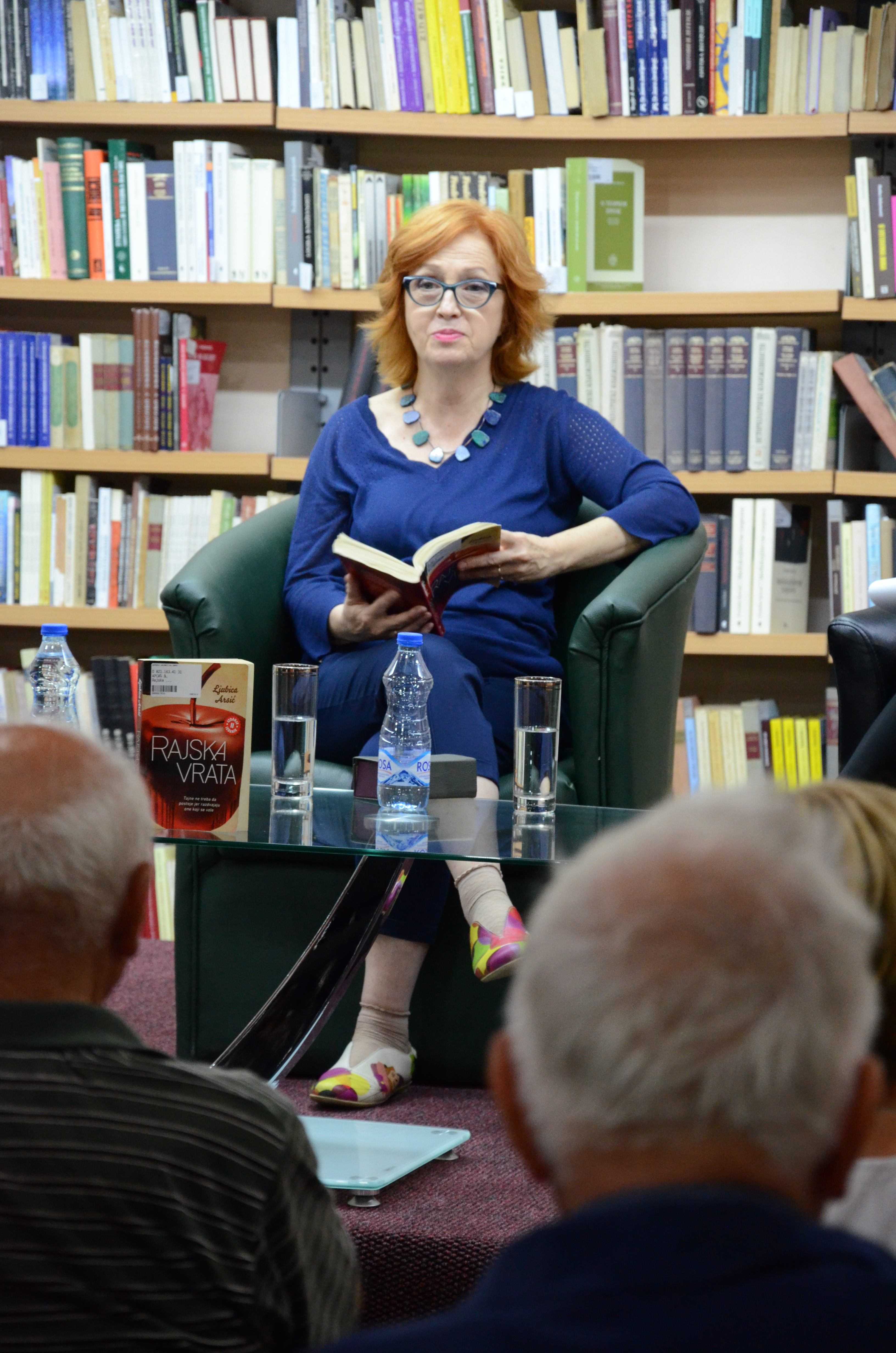 Ljubica Arsić, književnica na gostovanju u Narodnoj biblioteci Pirot